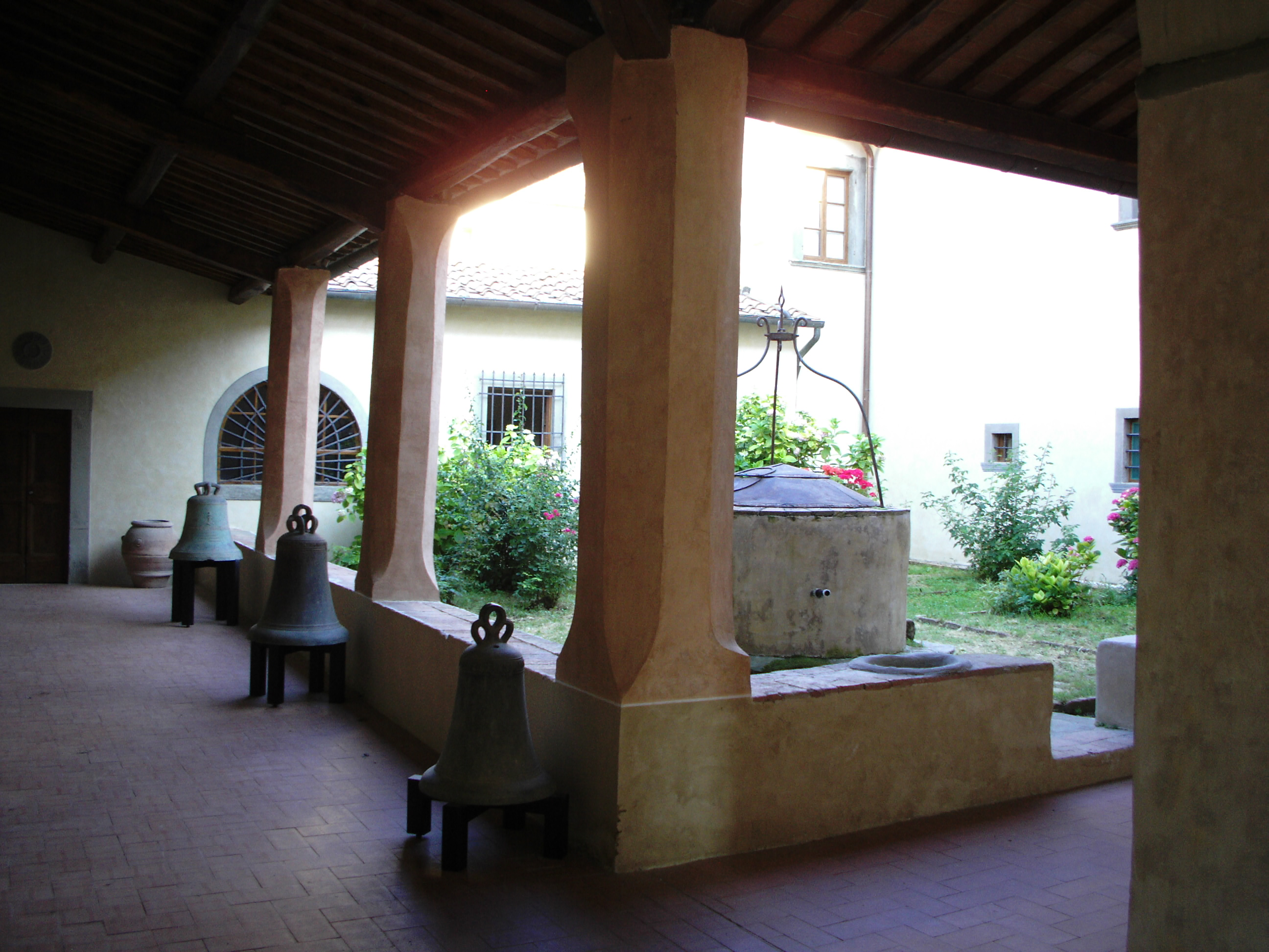 Tavarnelle val di Pesa, Chiostro della Pieve di San Piero in Bossolo